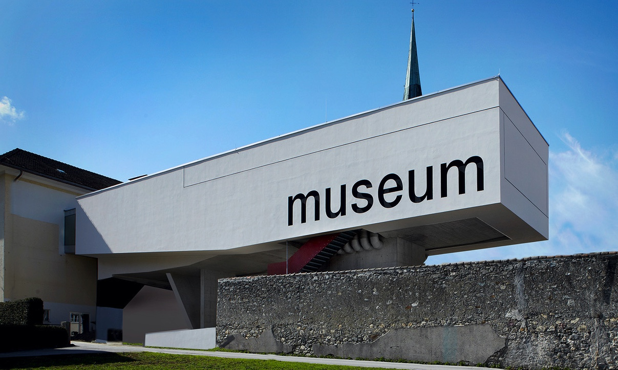 Fassade, Neubau von 2013 Museum der Völker, St. Martin, im Osten der Stadt